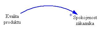 Základní vyjádření kauzálního vztahu v diagramu kauzálních smyček.